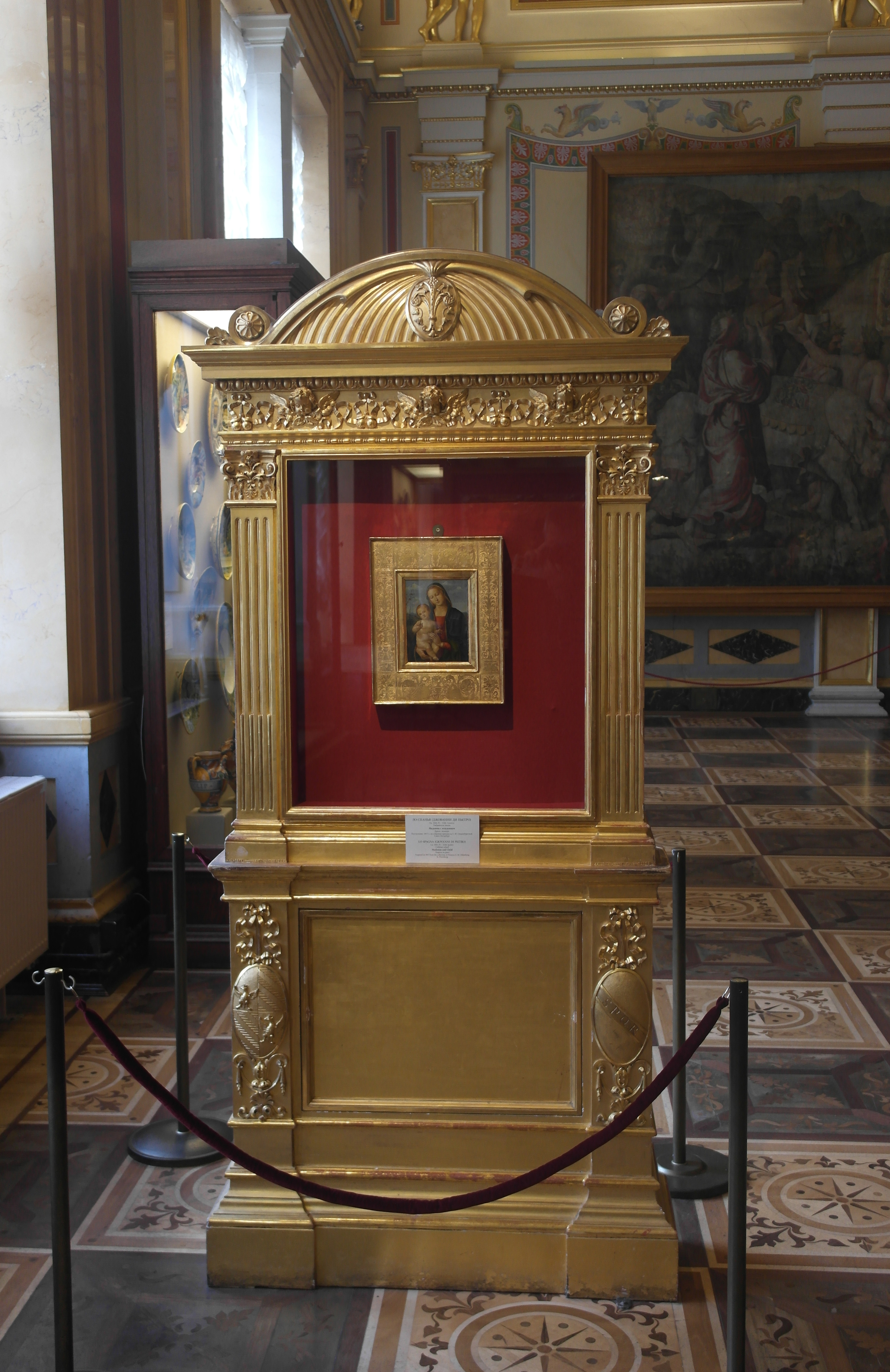 Картина Ло Спанья "Мадонна с Младенцем"